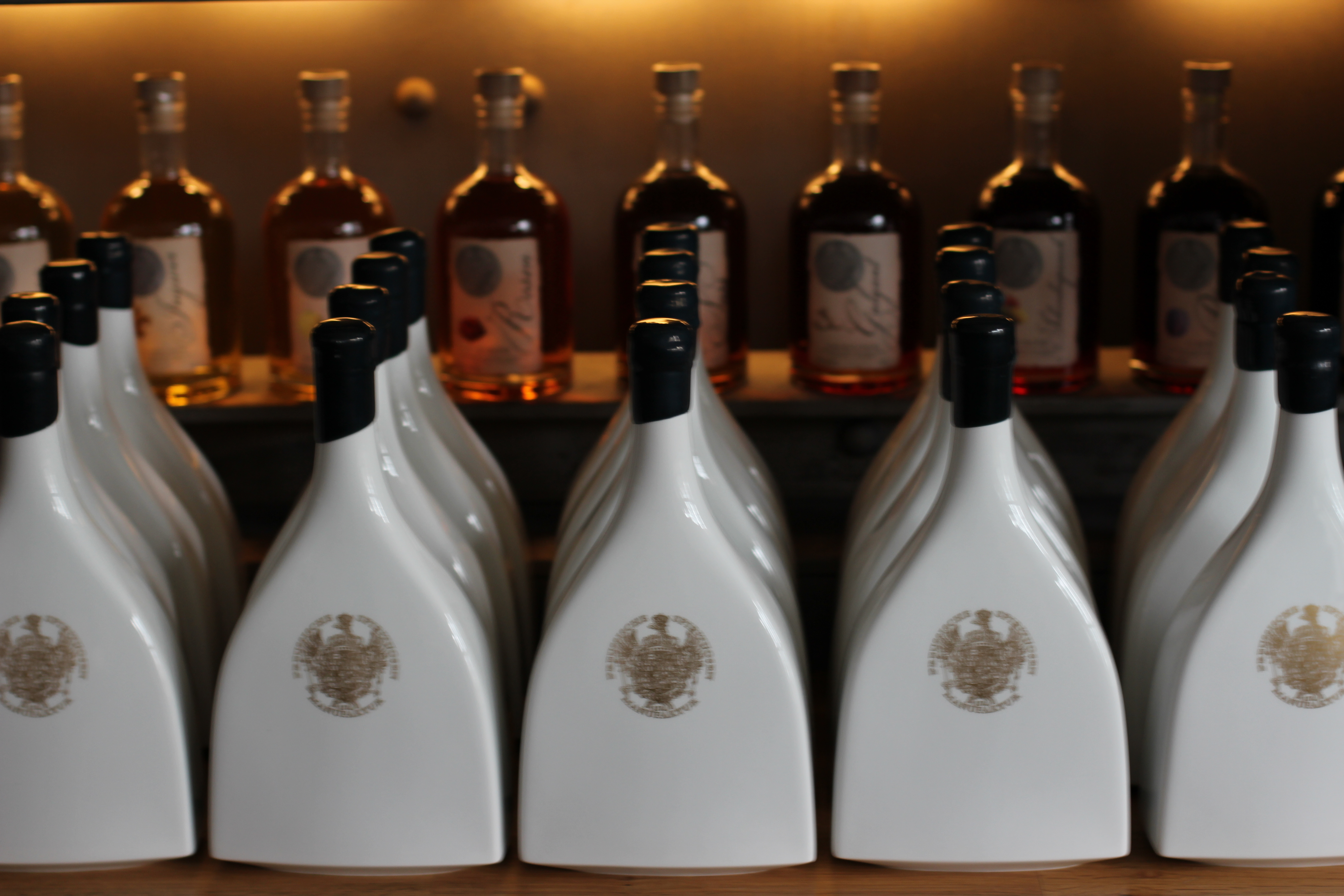 Gin-Flaschen der Preussischen Spirituosen Manufaktur aus Porzellan; hergestellt von der KPM nach einem Design von Tude Petri